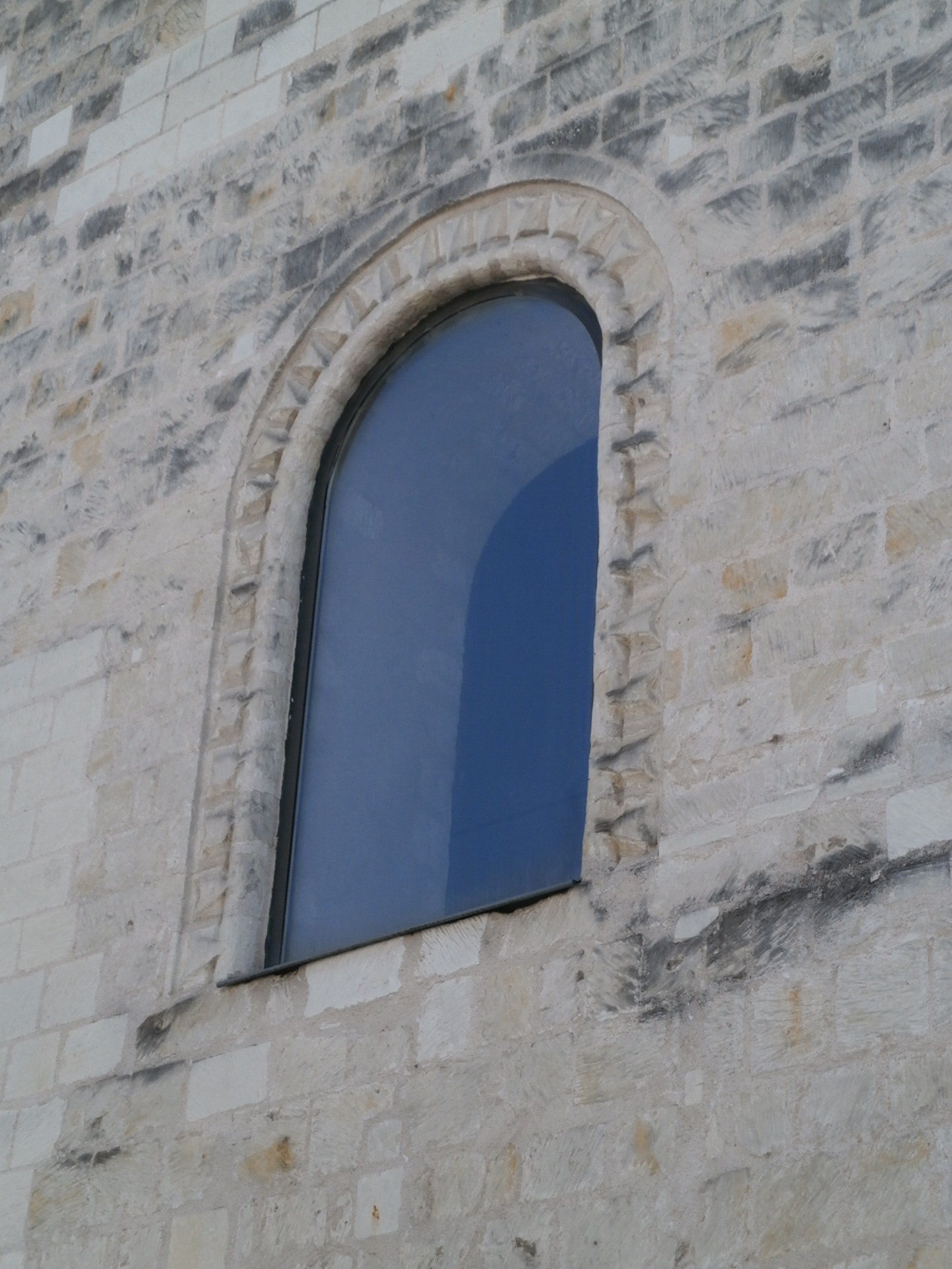 Chapelle Saint-Lazare (Tours) - détail d'une baie